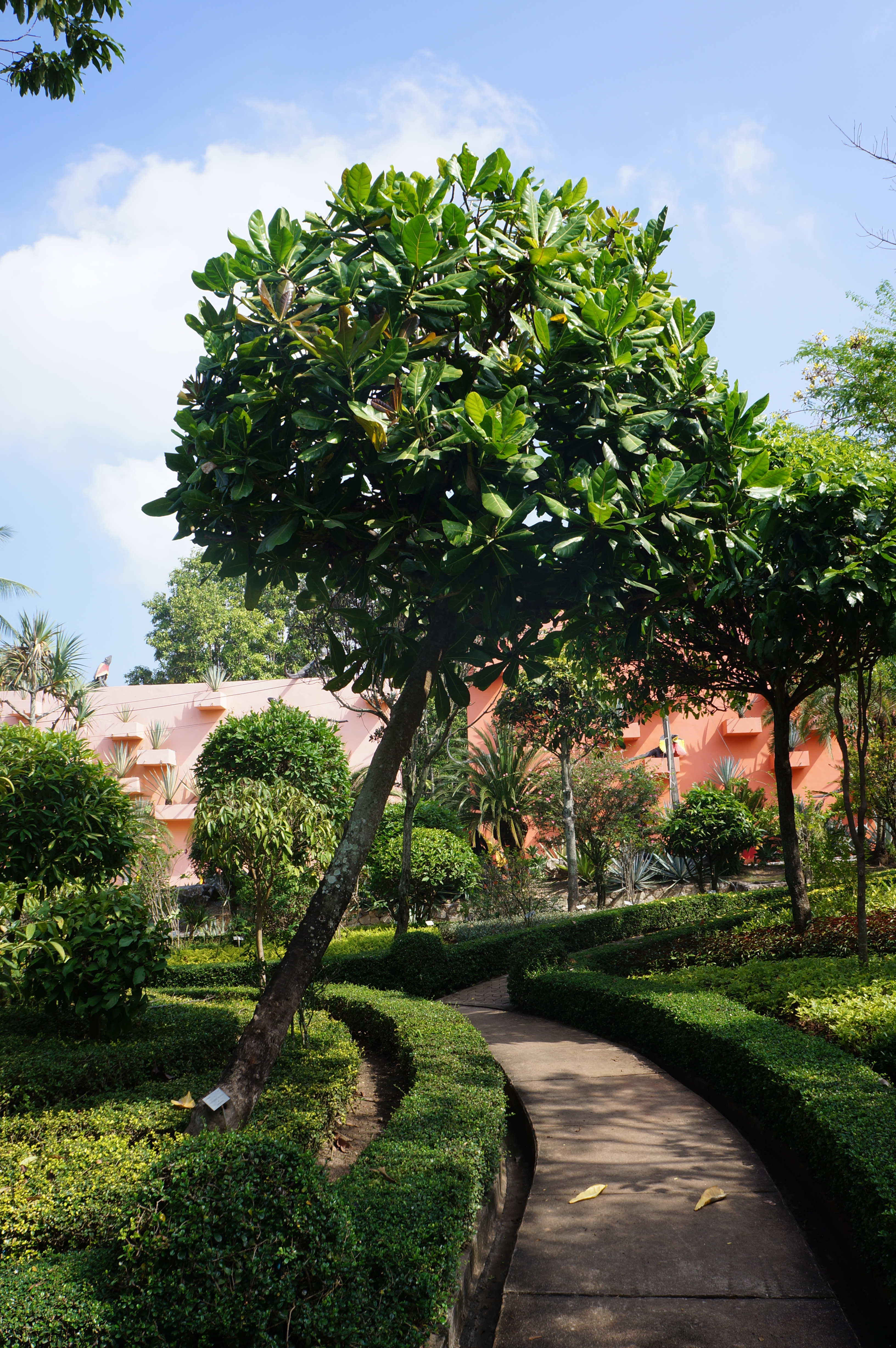 Barringtonia asiatica in the Botanical Garden Nong Nooch. Pattaya.